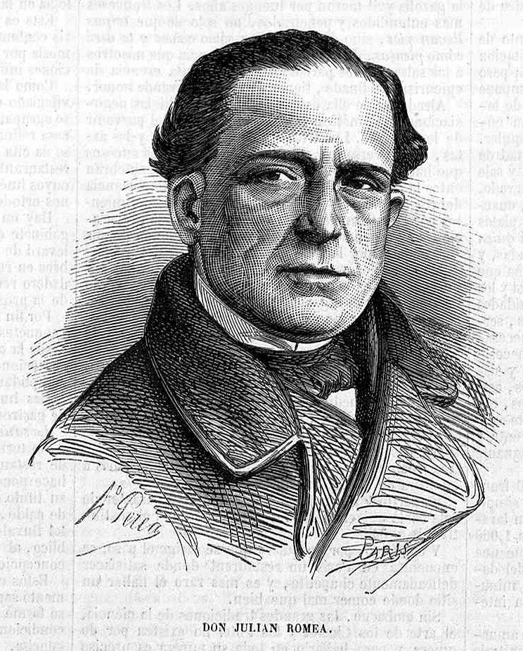 Julián Romea, en la revista española El Museo Universal.